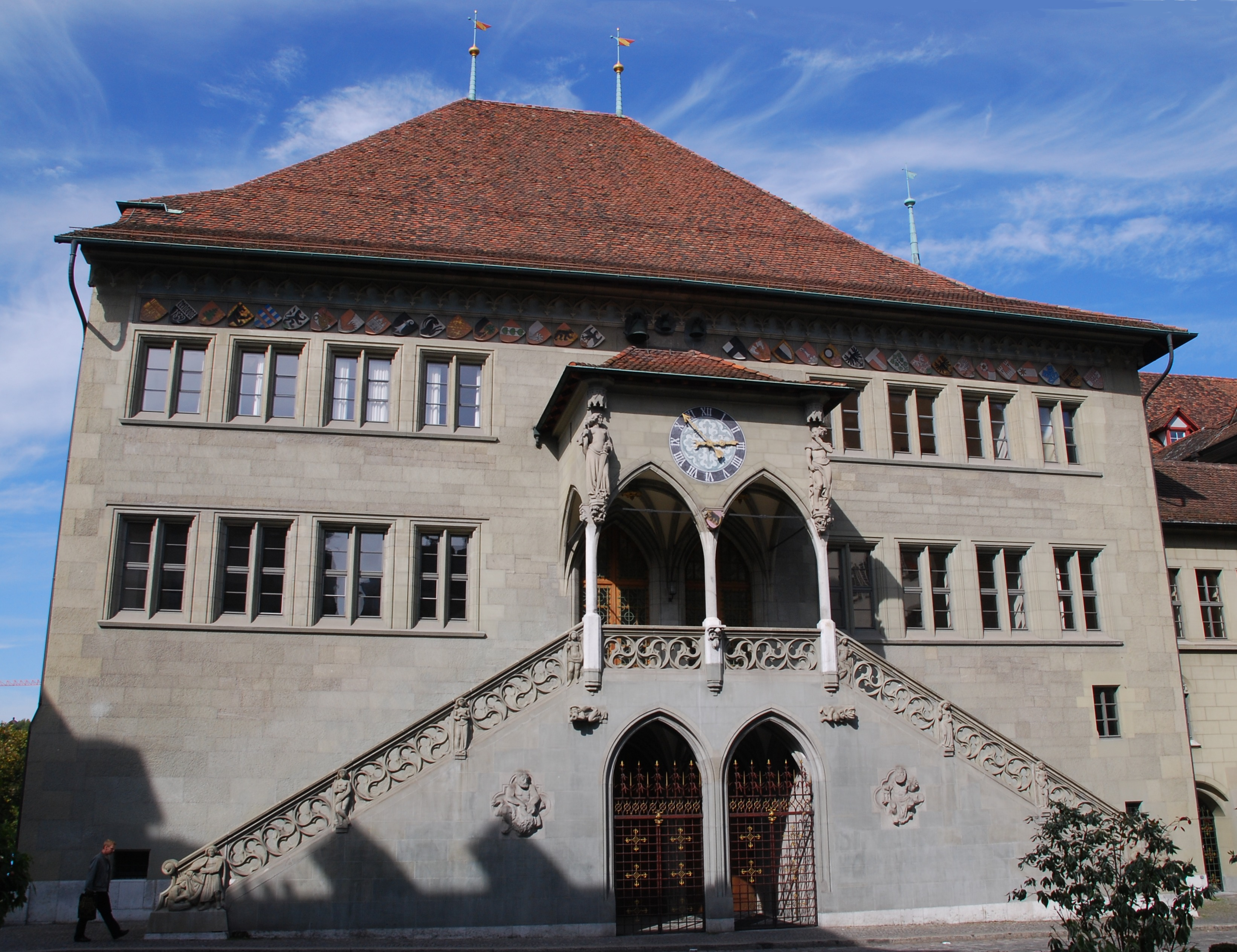 Rathaus Bern